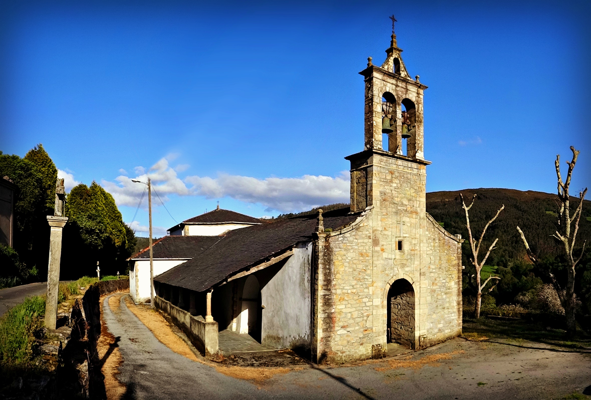 Iglesia de San Sebastián de Devesos